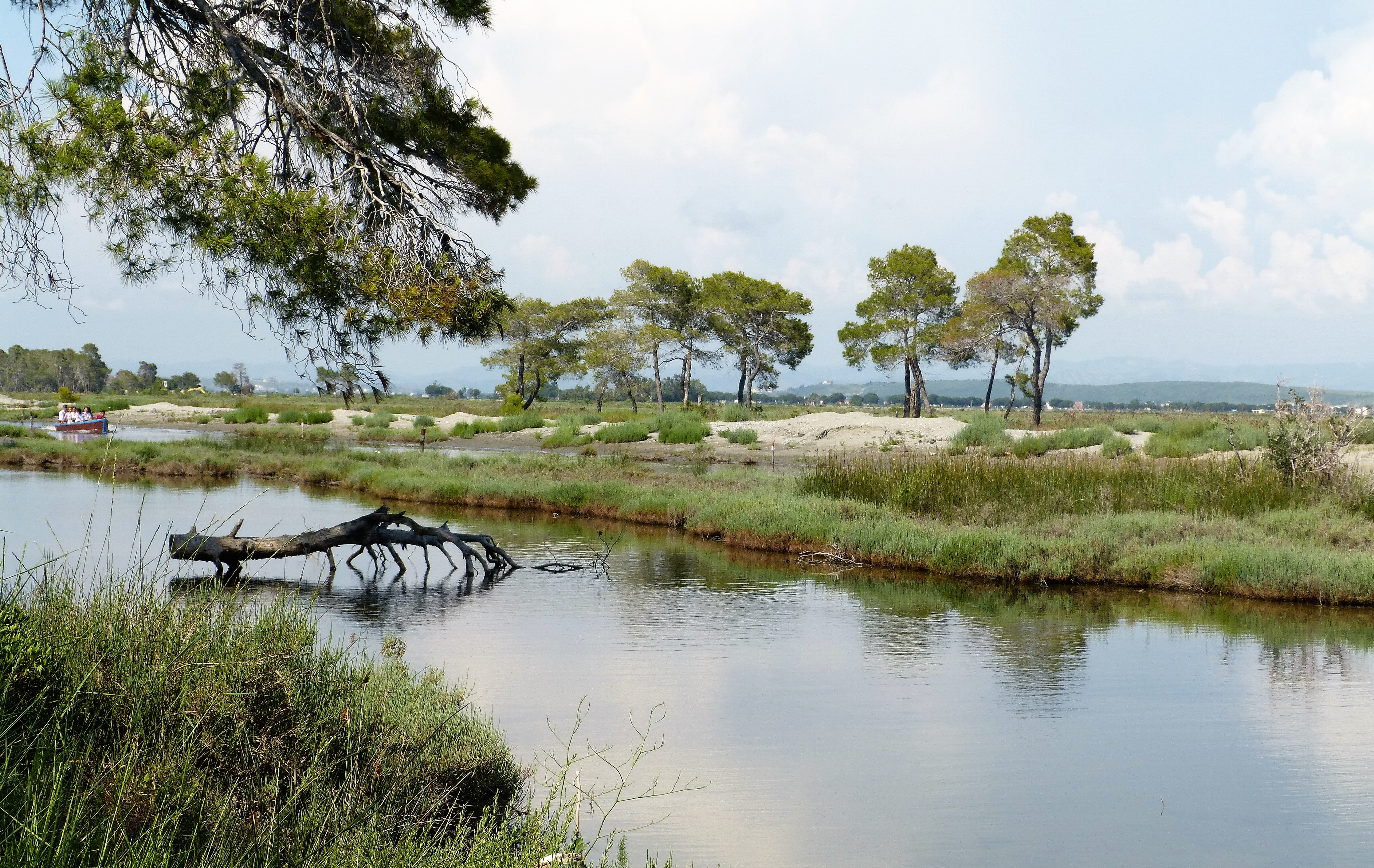 Karavasta National Park. Albania.